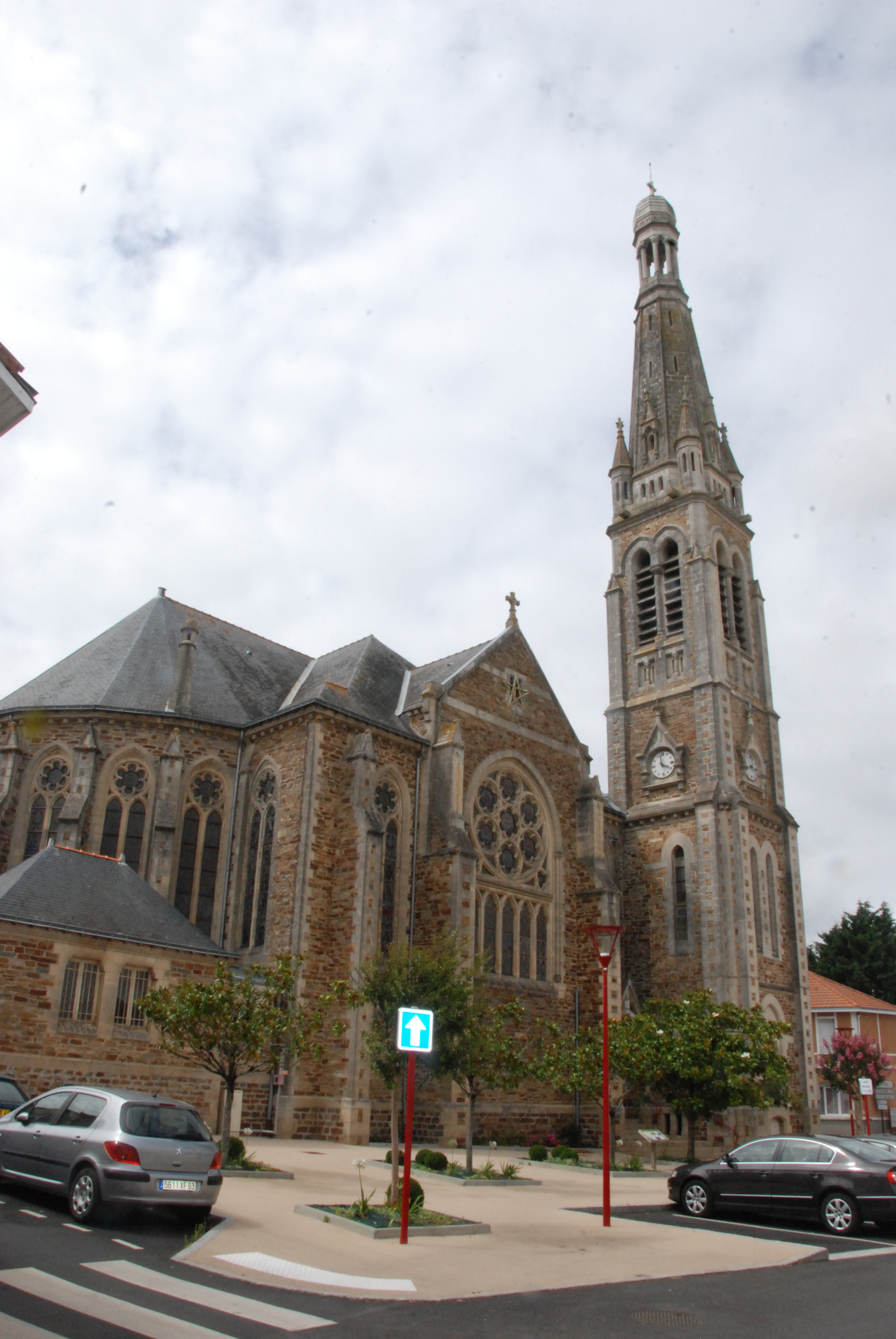 Eglise de Saint-Hilaire-de-Chaléons (Loire-Atlantique)